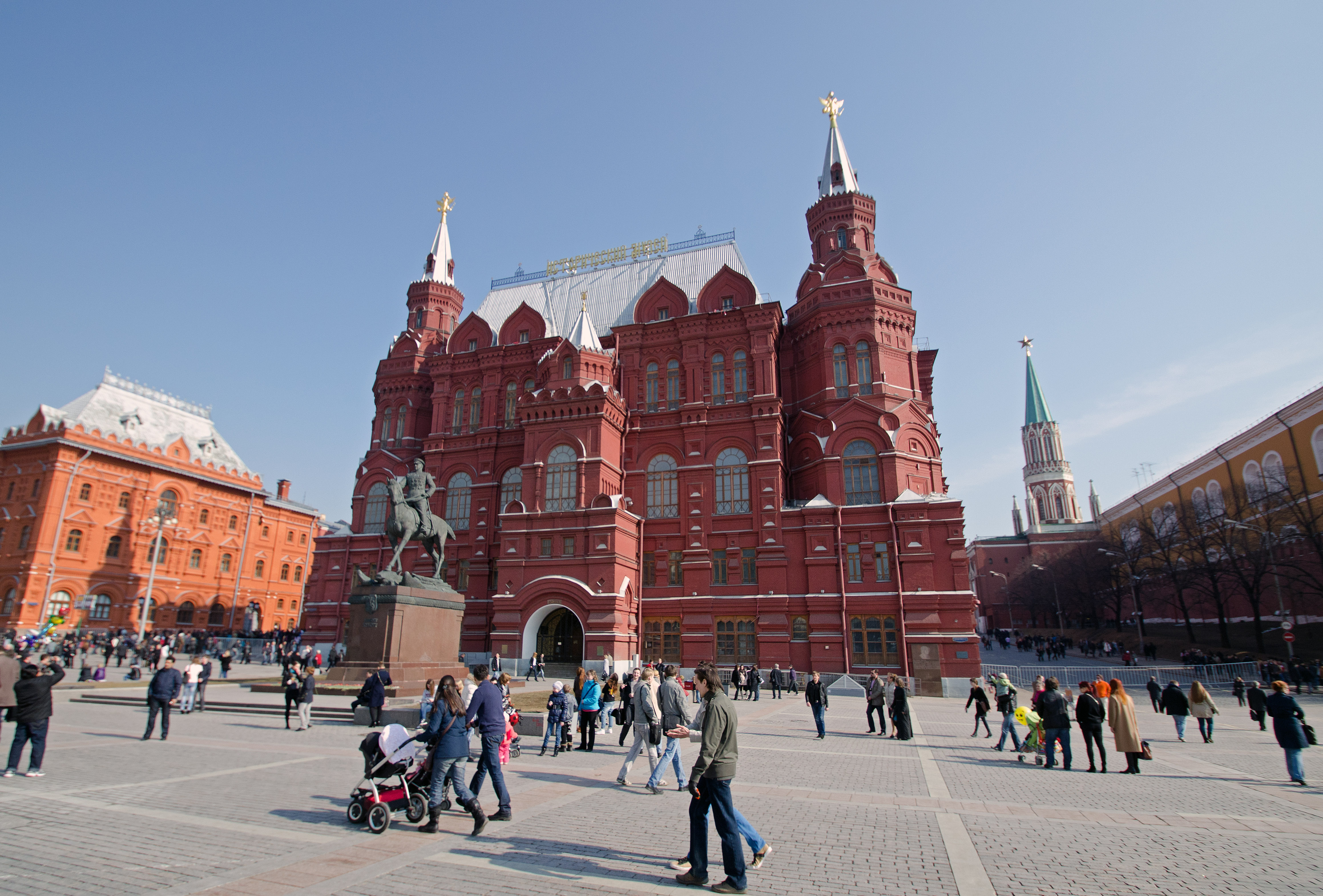 Moscow